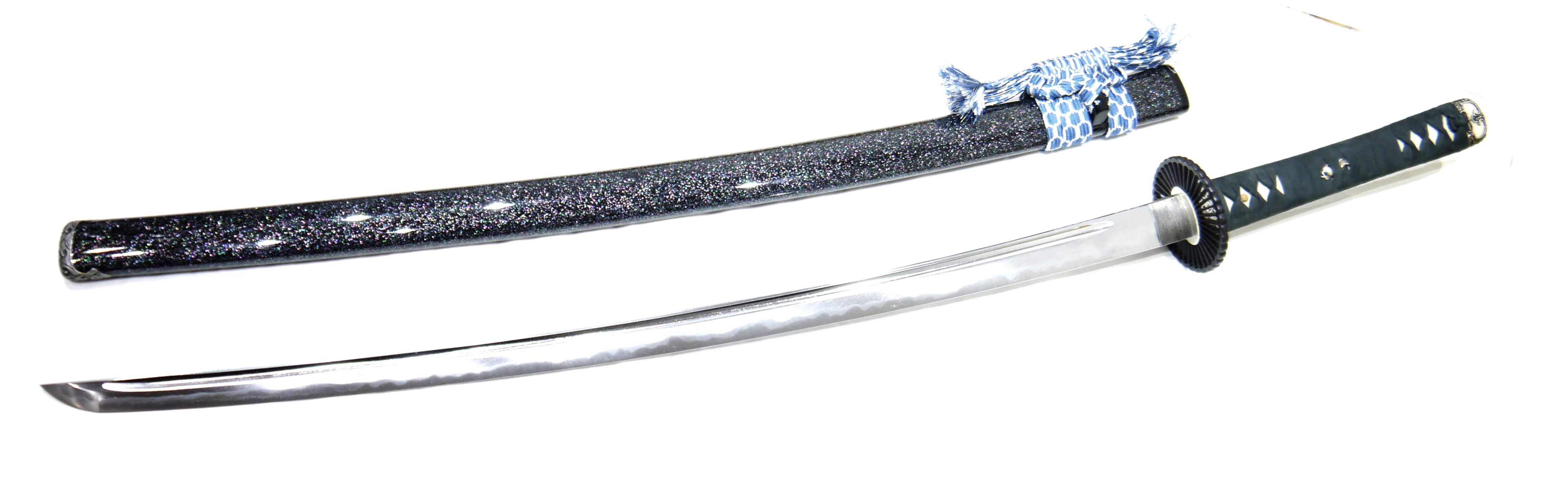 Iaito japonais fabriqué par l'atelier Jisei